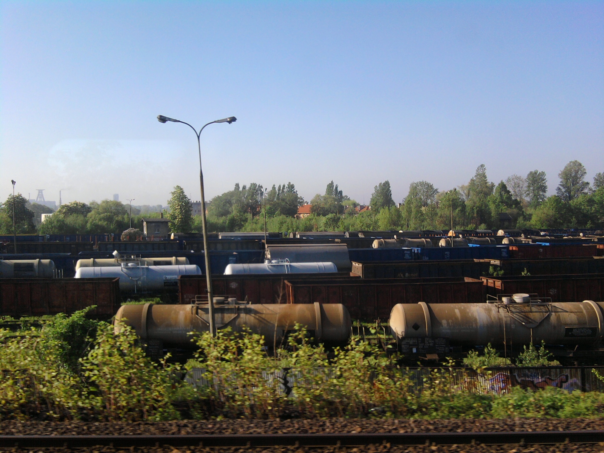 Gliwicka Fabryka Wagonów (dawne ZNTK Gliwice)